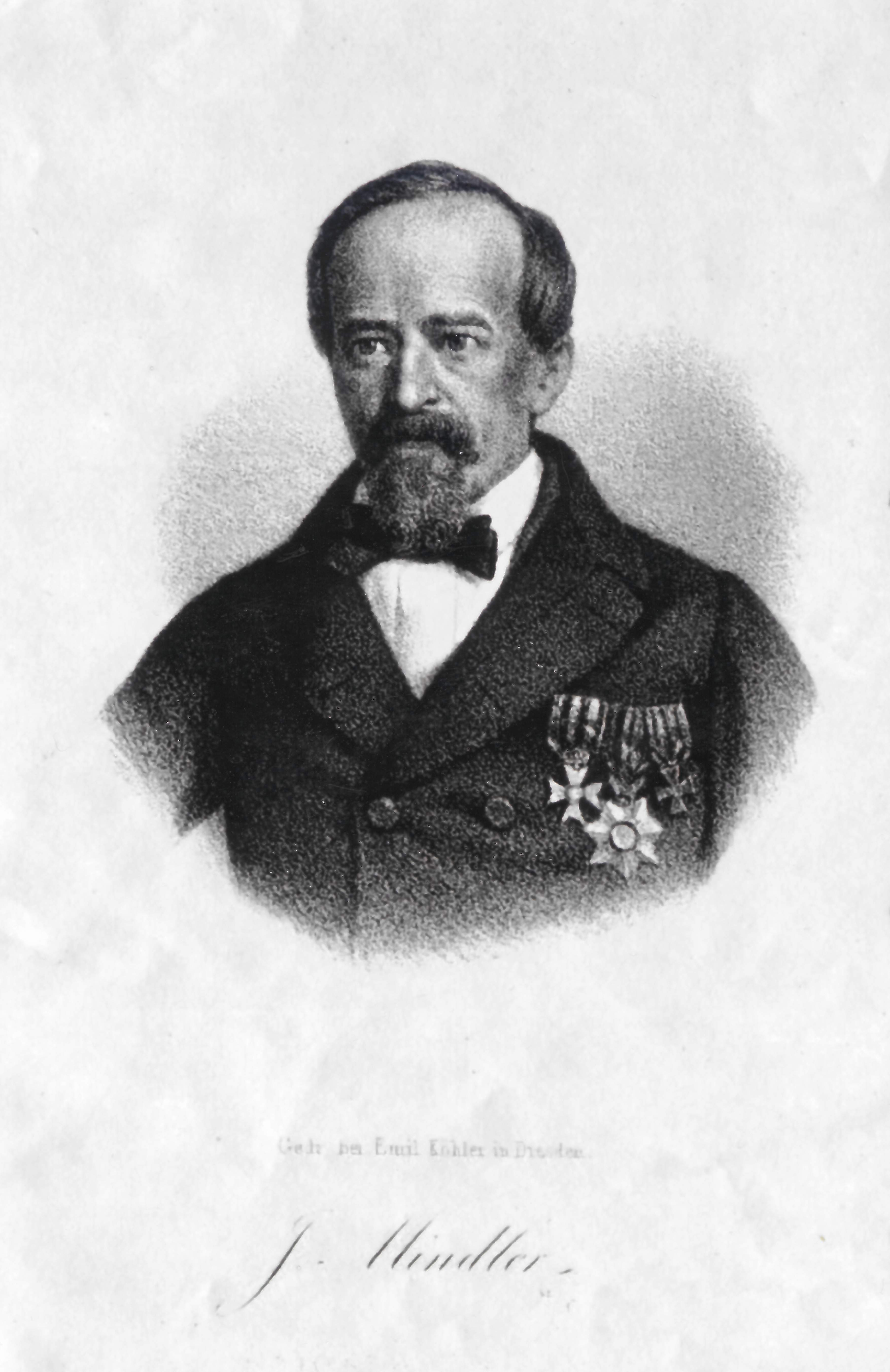 Porträt von Joseph Mindler.